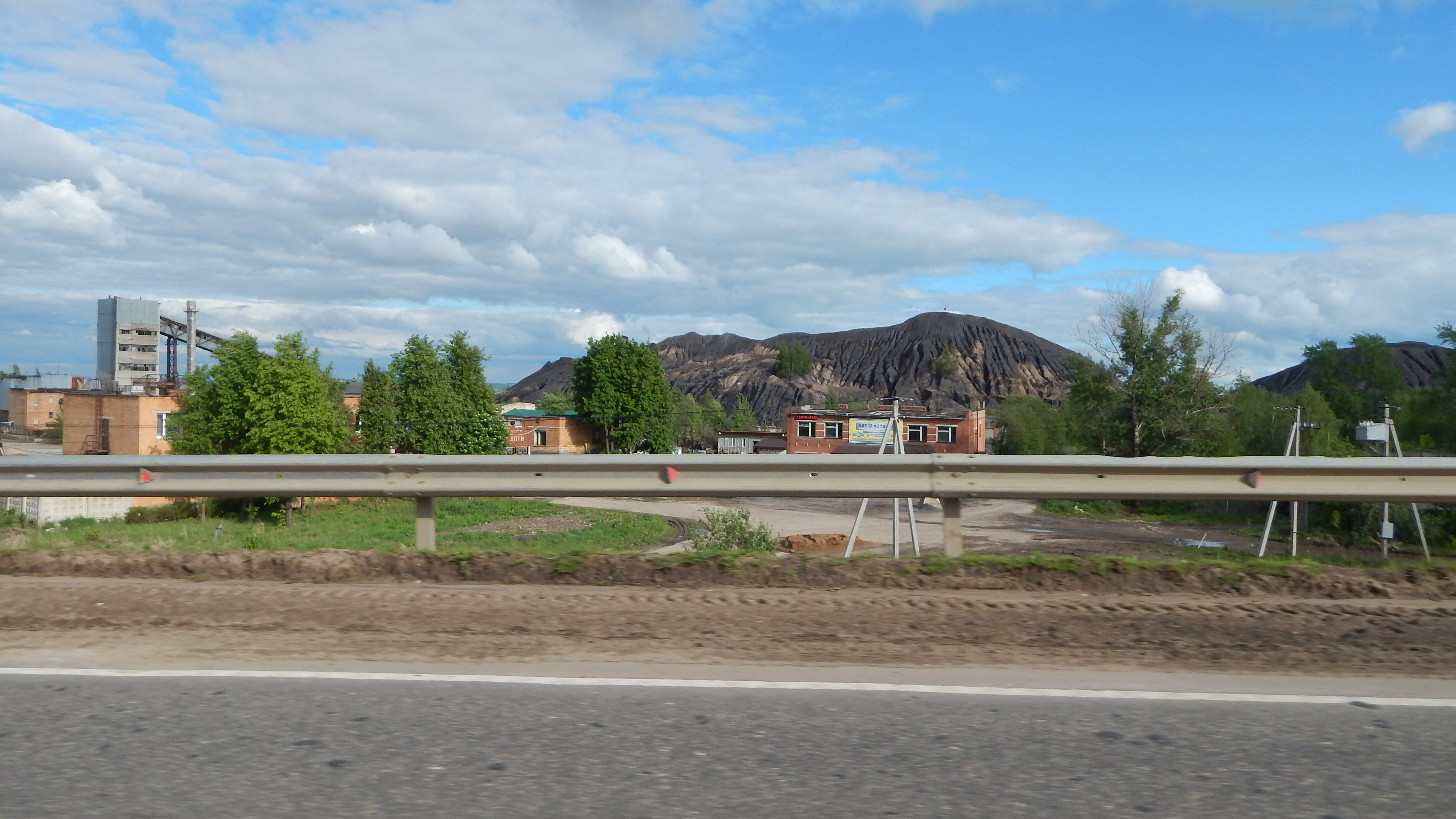 Терриконы Куровской шахты[1]. Посёлок Куровской до 2012 года находился в составе Дзержинского района Калужской области. Ныне входит в состав Ленинского округа города Калуги. Шахта была открыта в 1958 году, добывали на ней бурый уголь. Закрыта в начале 90-х, шахту затопили, входы засыпали. Сейчас заброшена. Посёлок Куровской интересен тем, что летом 2008 года злоумышленники за одну ночь разобрали 720 погонных метров рельсов подъездного пути к шахте.